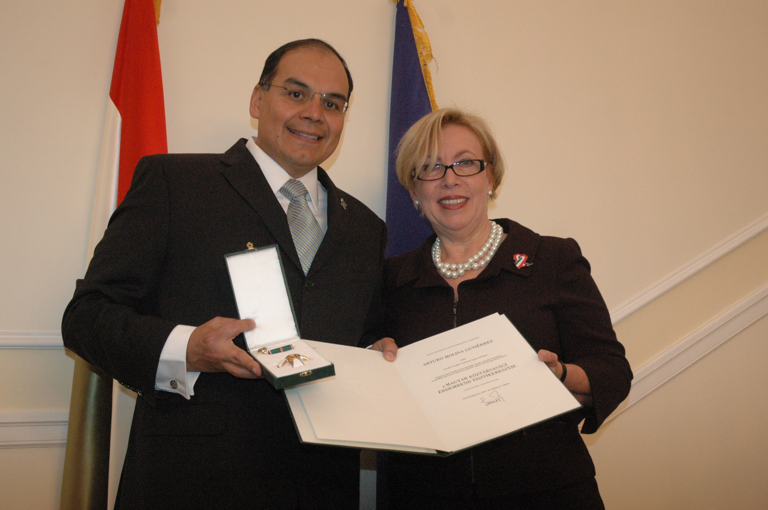 Dr Arturo Molina con la embajadora de Hungria a México, Teréz Dehelánné Dörömbözi, durante la presentación de la Orden al Mérito en Grado de Cruz de Oficial de Hungría en la Ciudad de México [1]